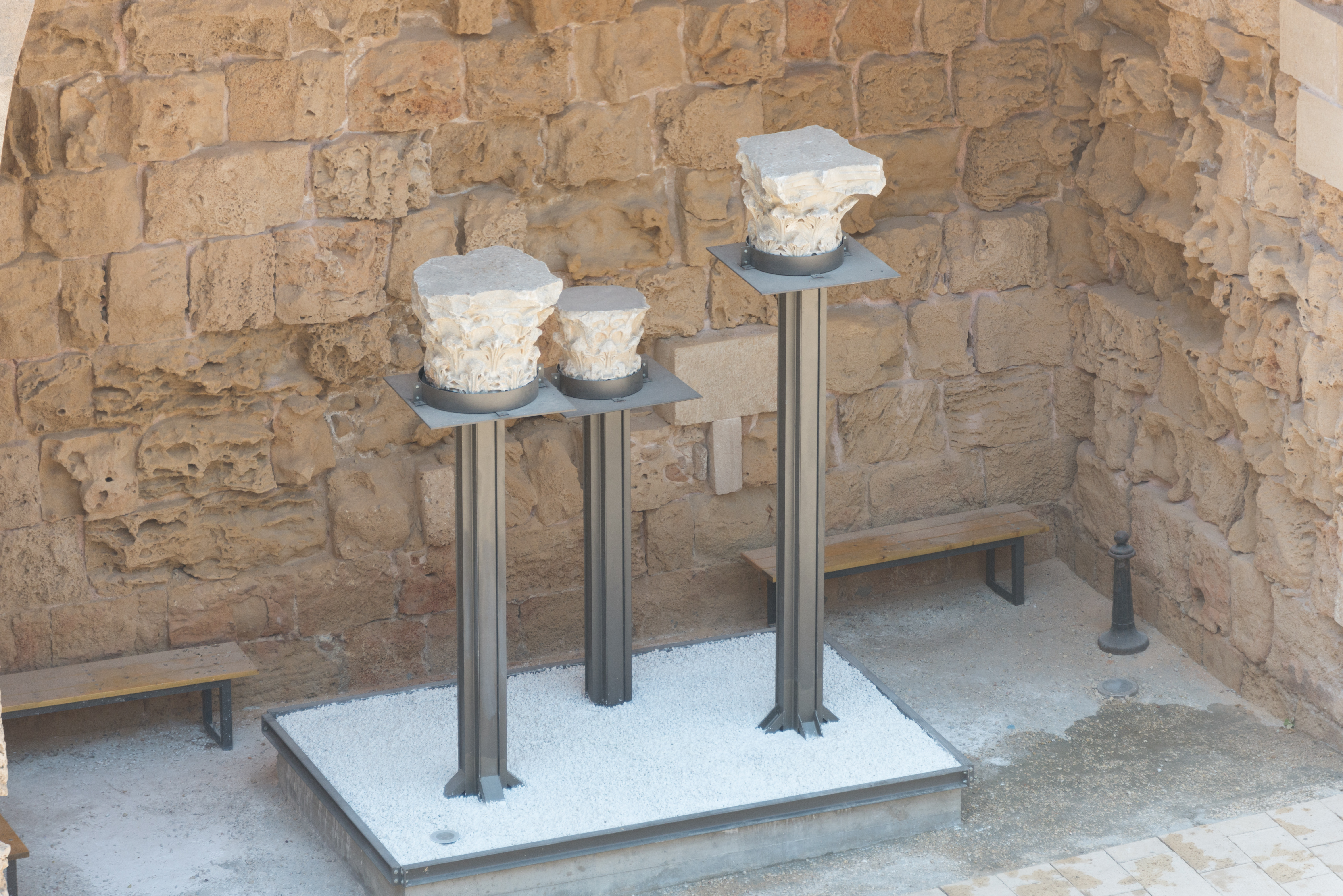 Acre